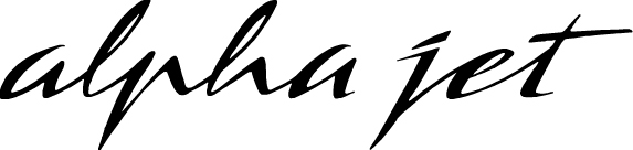 Dassault/Dornier Alpha Jet logo